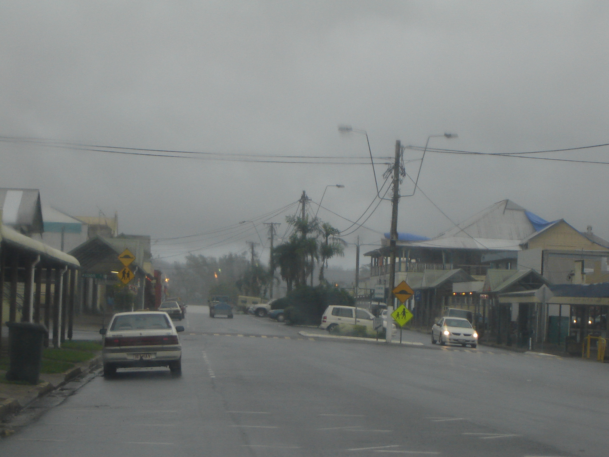 Babinda, taken on a rainy day.